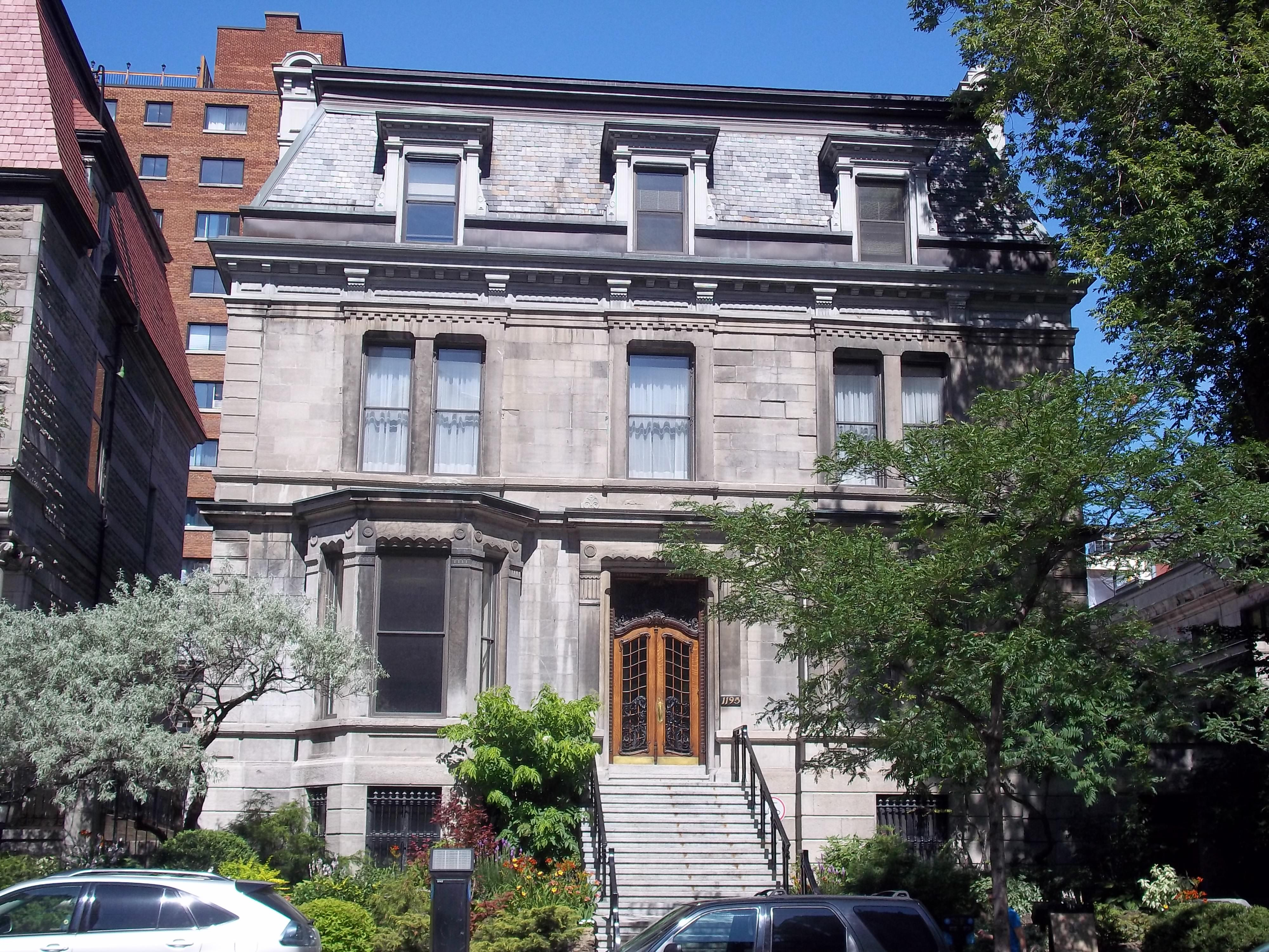 Maison Louis-Joseph-Forget, 1195, rue Sherbrooke ouest, Montréal